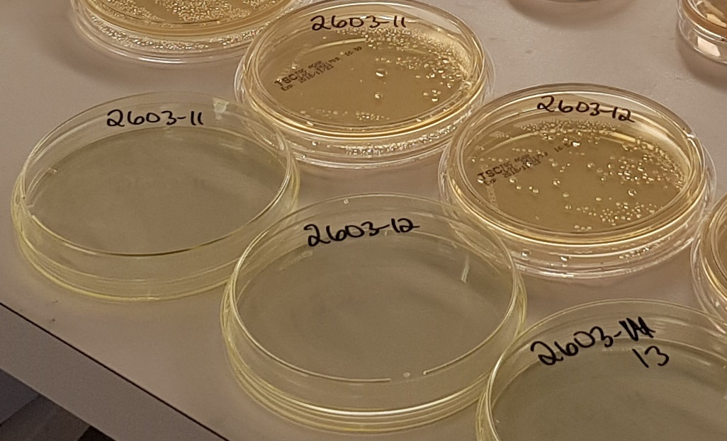 Petriskåler for testing av bakterieinnhold i drikkevann.